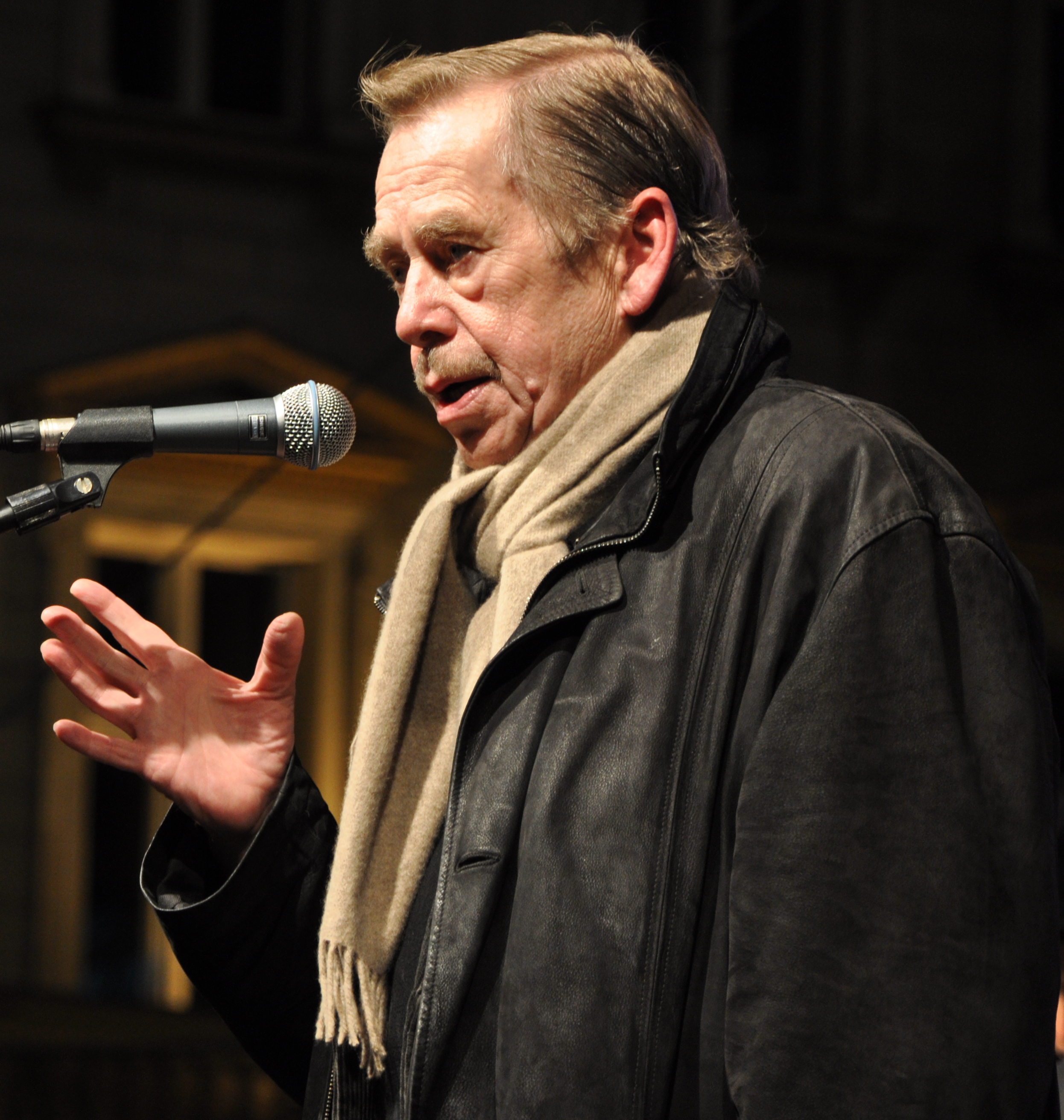 Václav Havel na Václavském náměstí 17. listopadu 2009.